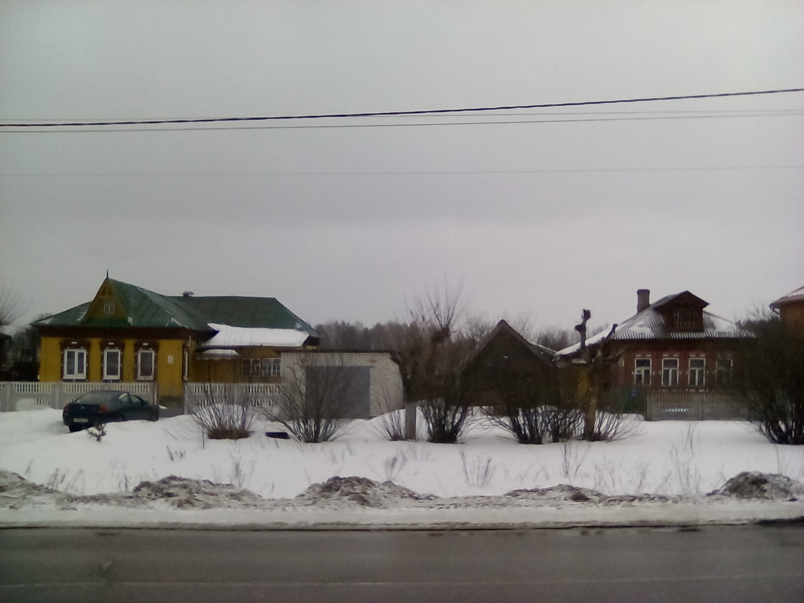 Деревянные дома Павловского Посада